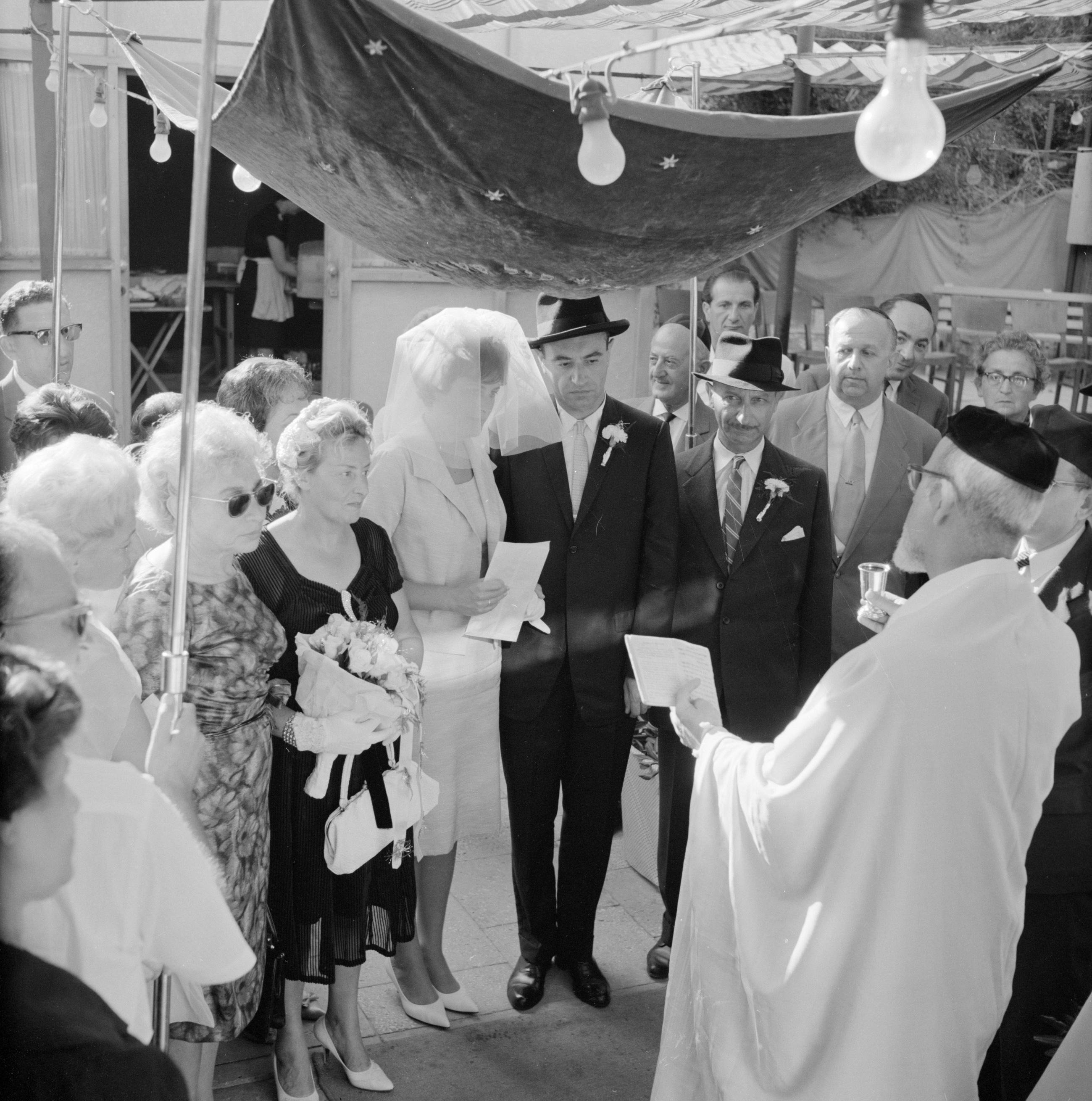 Collectie / Archief : Fotocollectie Van de Poll Reportage / Serie : Israël 1964-1965: Tel Aviv, huwelijk Beschrijving : Tel Aviv. Huwelijkssluiting. De gesluierde bruid en de bruidegom staan onder de Choepa terwijl de rabbijn hen toespreekt Annotatie : Bruid en bruidegom (Kallah en Chatan) staan uiteindelijk samen onder een Choepa (huwelijksbaldakijn) nadat de bruid zeven keer de Choepa en haar bruidegom heeft omcirkeld, welke veelal buiten wordt opgesteld en die hun 'open huis' (gastvrijheid), voorstelt Datum : 1964 Locatie : Israël, Tel Aviv Trefwoorden : baldakijnen, bruidsboeketten, feestverlichting, gewaden, hoofddeksels, huwelijksvoltrekkingen, joodse religie, rabbijnen, sluiers Fotograaf : Poll, Willem van de, [onbekend] Auteursrechthebbende : Nationaal Archief Materiaalsoort : Negatief (zwart/wit) Nummer archiefinventaris : bekijk toegang 2.24.14.02 Bestanddeelnummer : 255-1998